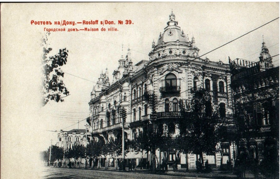 Ростов-на-Дону. Городской дом. Открытка.